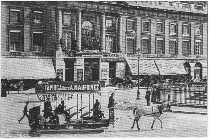 Vue de la place royale de Reims avec au premier plan un tramway hippomobile et en arrière plan l'ancien hôtel des fermes maintenant sous-préfecture.